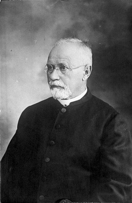 P. Franz Bartels S.V.D. China, Tsingtau P. Franz Bartels S.V.D., Erbauer und langjähriger Direktor des Hospitals in Tsingtau (gest. am 9. April 1928).